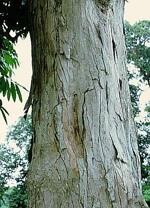 crabwood semente